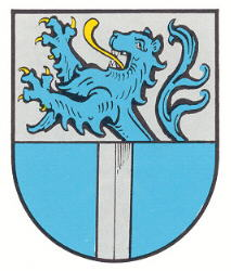 Coat of arms of Bettenhausen (outlying centre of Glan-Münchweiler) Wappen von Bettenhausen (Ortsteil von Glan-Münchweiler)